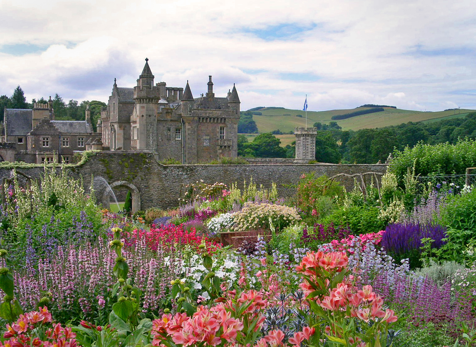 Abottsford